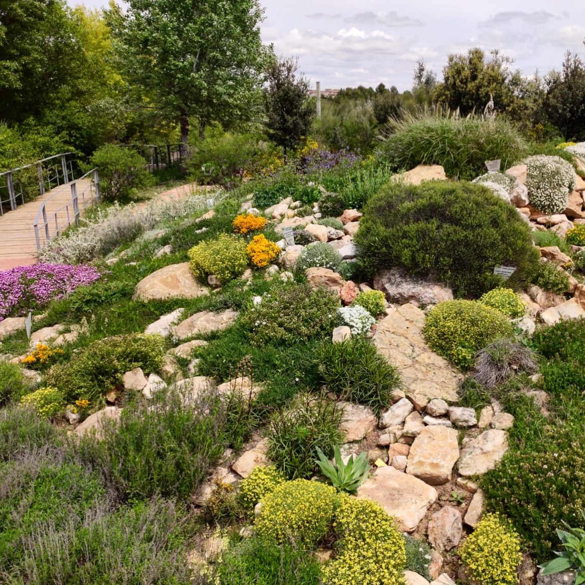 Jardín en rocalla del JBCLM.